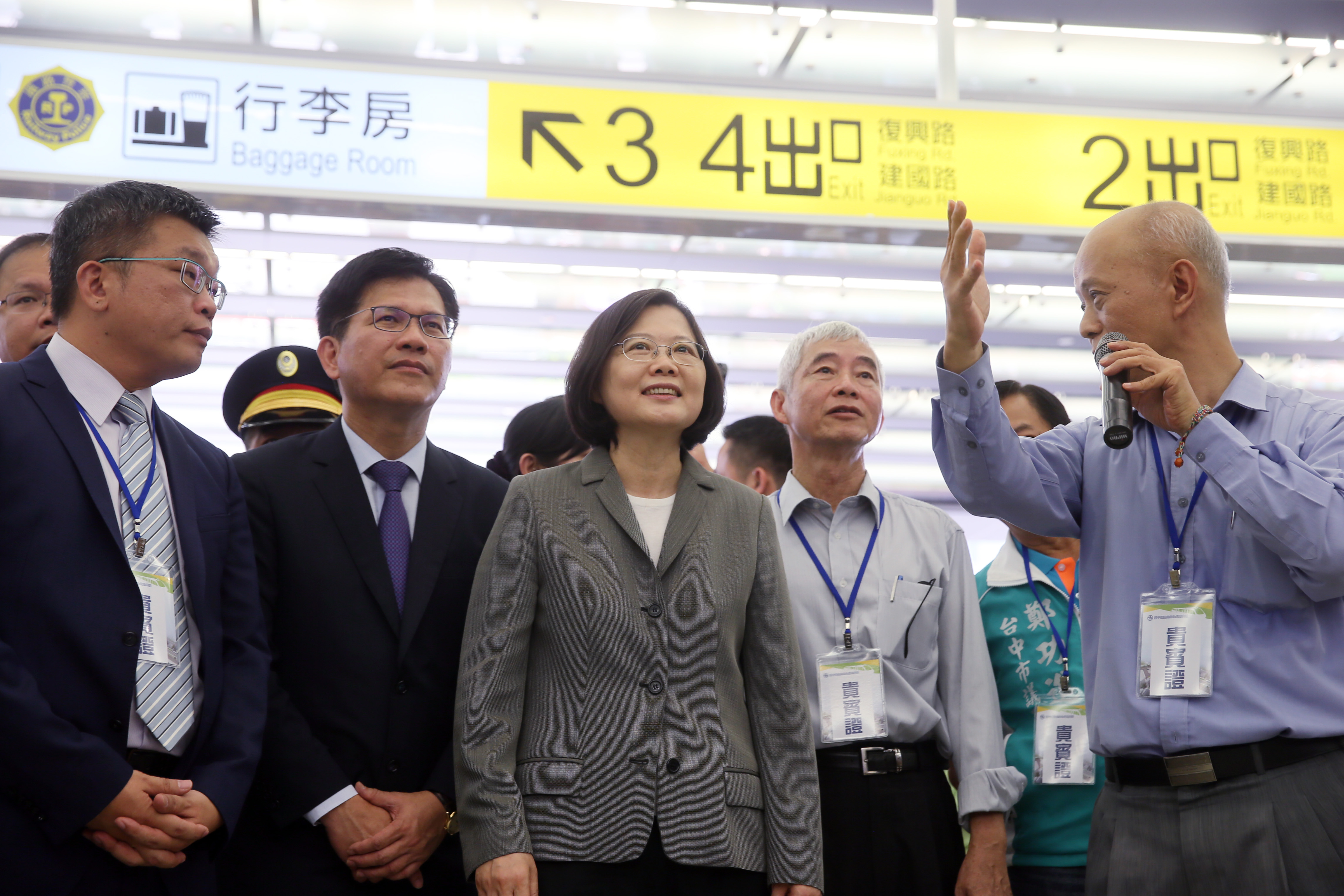 10.16 總統與台中市長林佳龍、交通部長賀陳旦等一同視察台中車站新站體